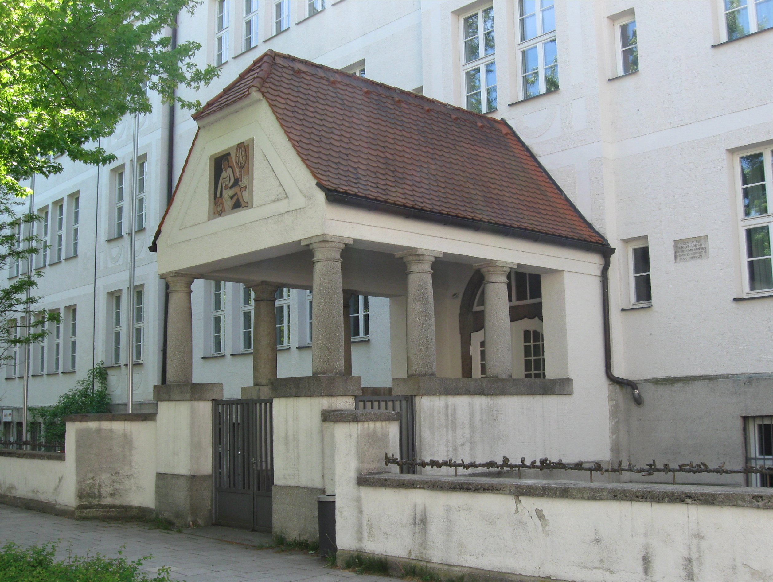 Agilolfingerplatz 1; Volksschule, stattlicher barockisierender Gruppenbau, 1905-07 von Hans Grässel, lobende Erwähnung beim Fassadenpreis 2004